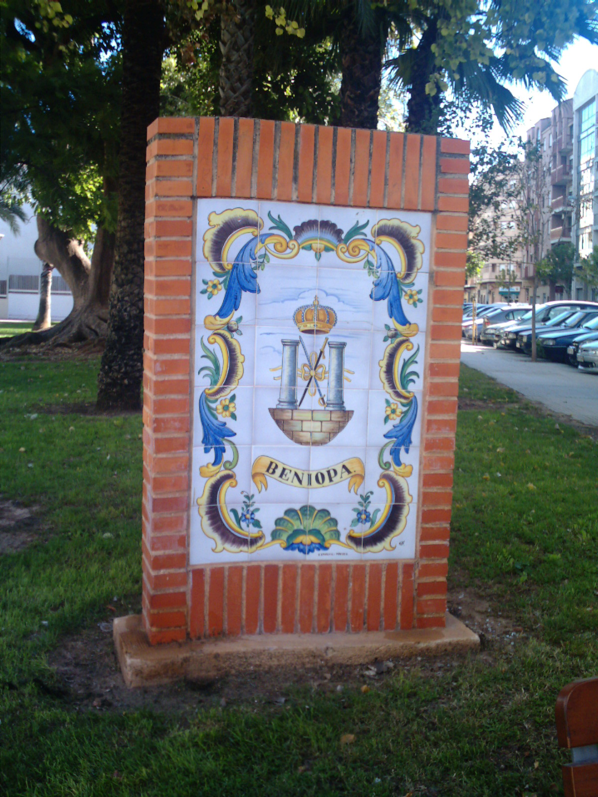 Cerámica con el escudo de Beniopa